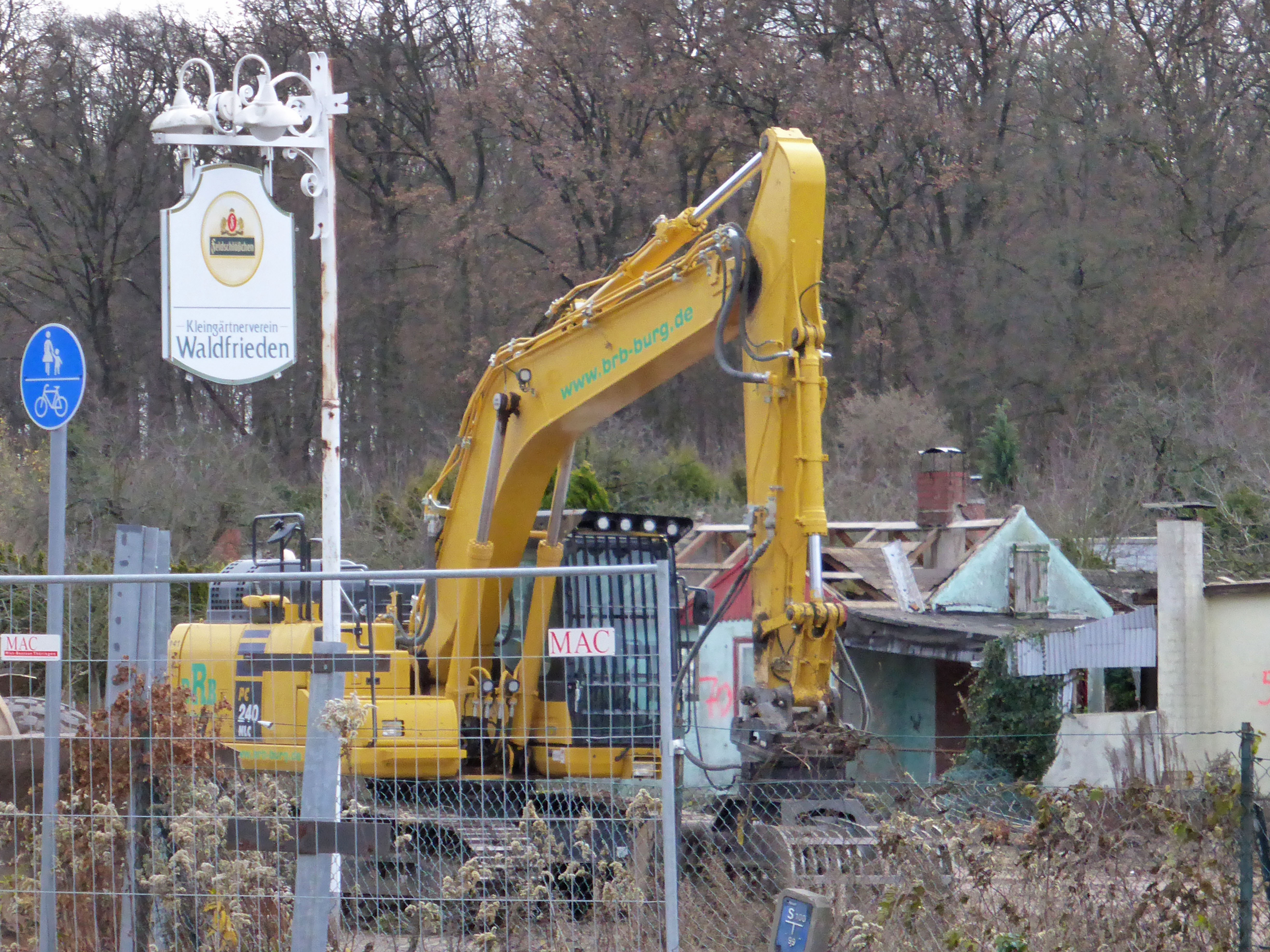 Abriss der Kleingartenanlage "Waldfrieden" in Wolfsburg.. zugunsten von Wohnhäusern